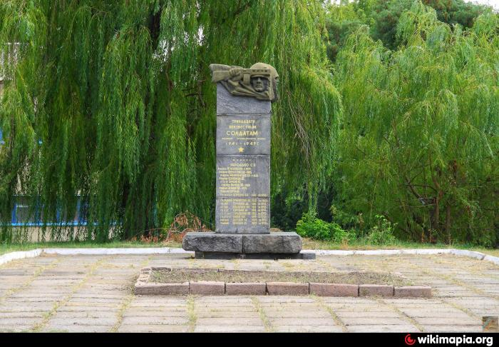 Братська могила партизанів громадянської війни і радянських воїнів, Красноторка, вул. Білгородська, 65